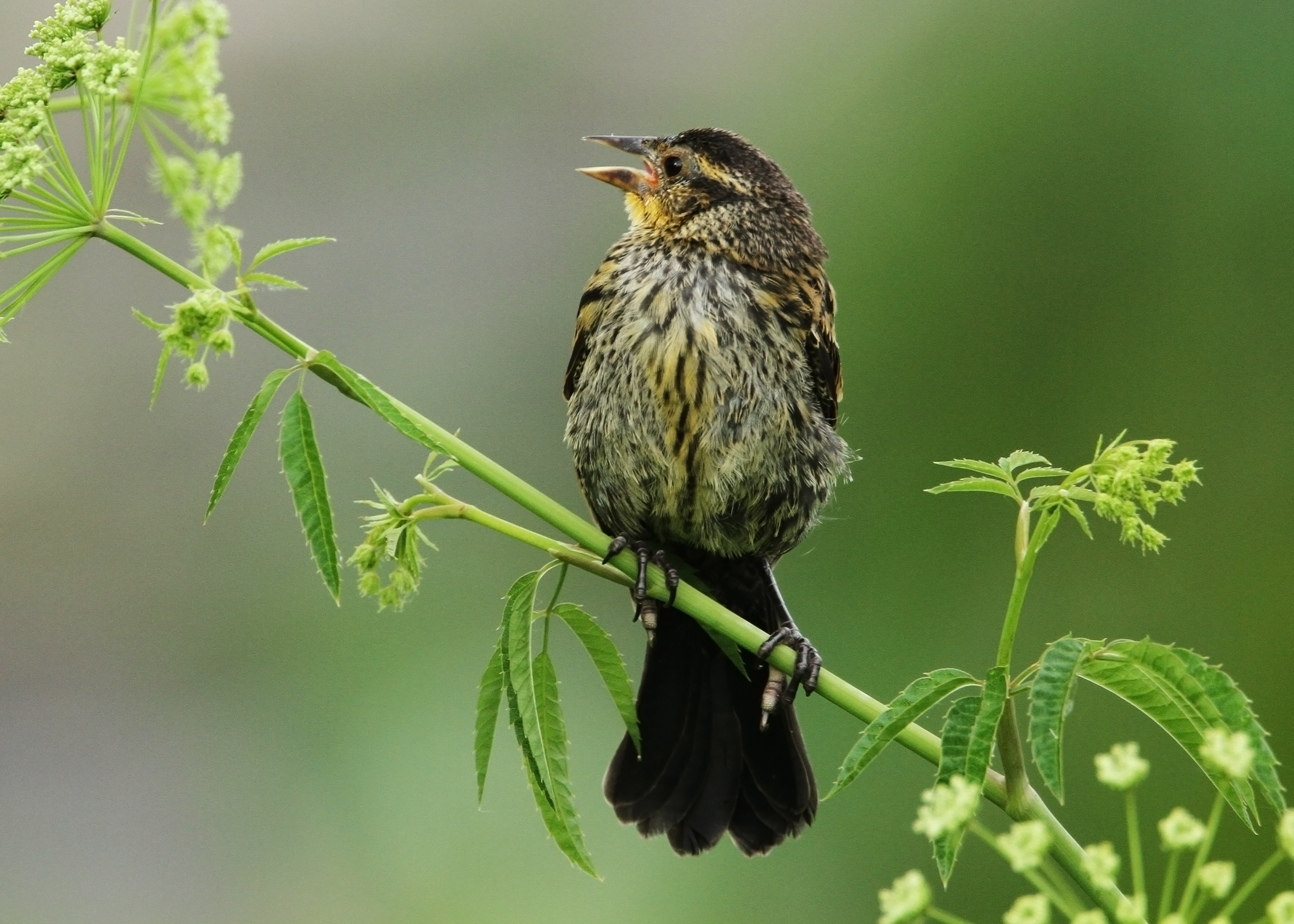 Agelaius phoeniceus